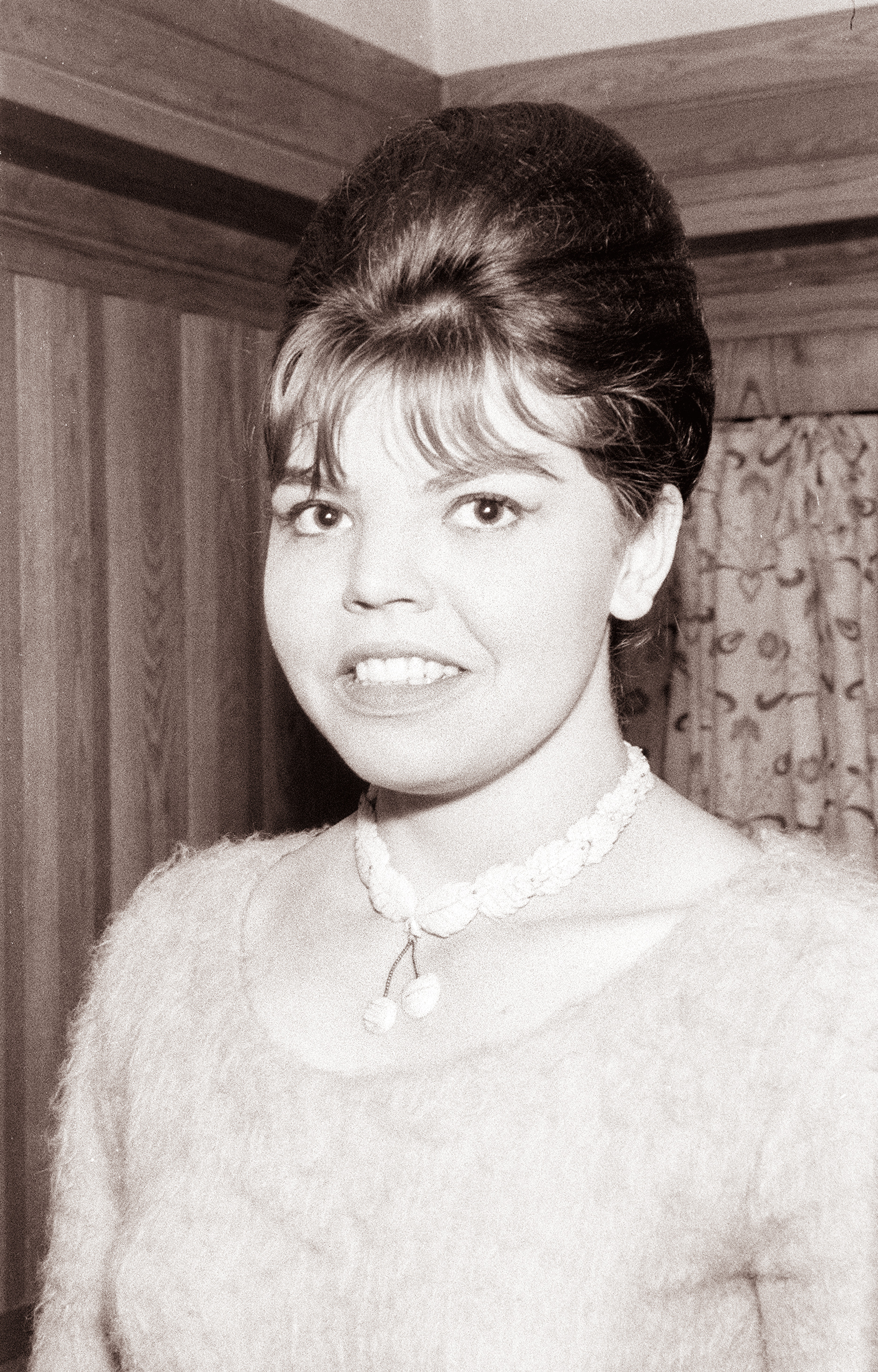 Irena Kohont